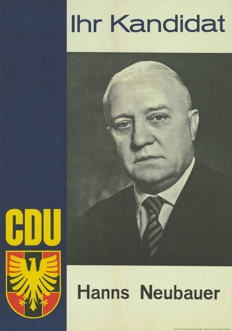 Ihr Kandidat CDU Hanns Neubauer Abbildung: Porträtfoto Kommentar: Ein Exemplar ist auf der Rückseite rot beschriftet. Plakatart: Kandidaten-/Personenplakat mit Porträt Auftraggeber: Verantw.: CDU-Bundesgeschäftsstelle Bonn Drucker_Druckart_Druckort: Repro-Druck, Schmiden bei Stuttgart Objekt-Signatur: 10-010 : 211 Bestand: Landtagswahlplakate Rheinland-Pfalz (10-010) GliederungBestand10-18: Landtagswahlplakate Rheinland-Pfalz (10-010) » CDU Lizenz: KAS/ACDP 10-010 : 211 CC-BY-SA 3.0 DE